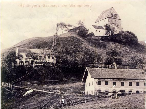 Geburtshaus Nobert Hauner, Komponist, Stampflberg, Au am Inn